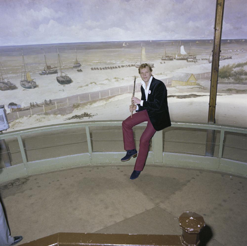 De Finse zanger Vesa-Matti Loiri tijdens een fotosessie voor het Eurovisie Songfestival 1980